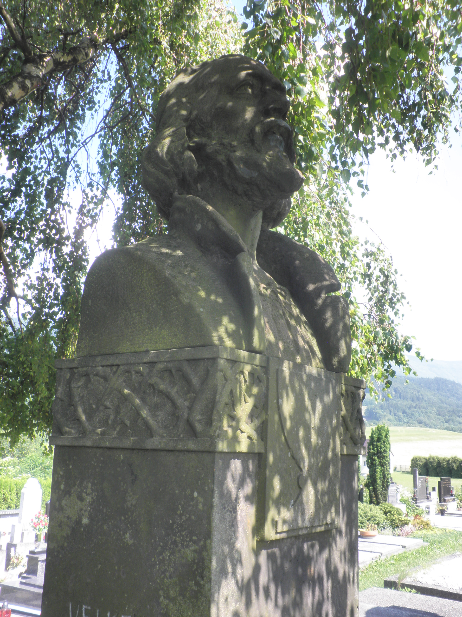 Pomník Mistra Jana Husa z r. 1921 na bývalém evangelickém hřbitově v Lubně (Frýdlant nad Ostravicí)